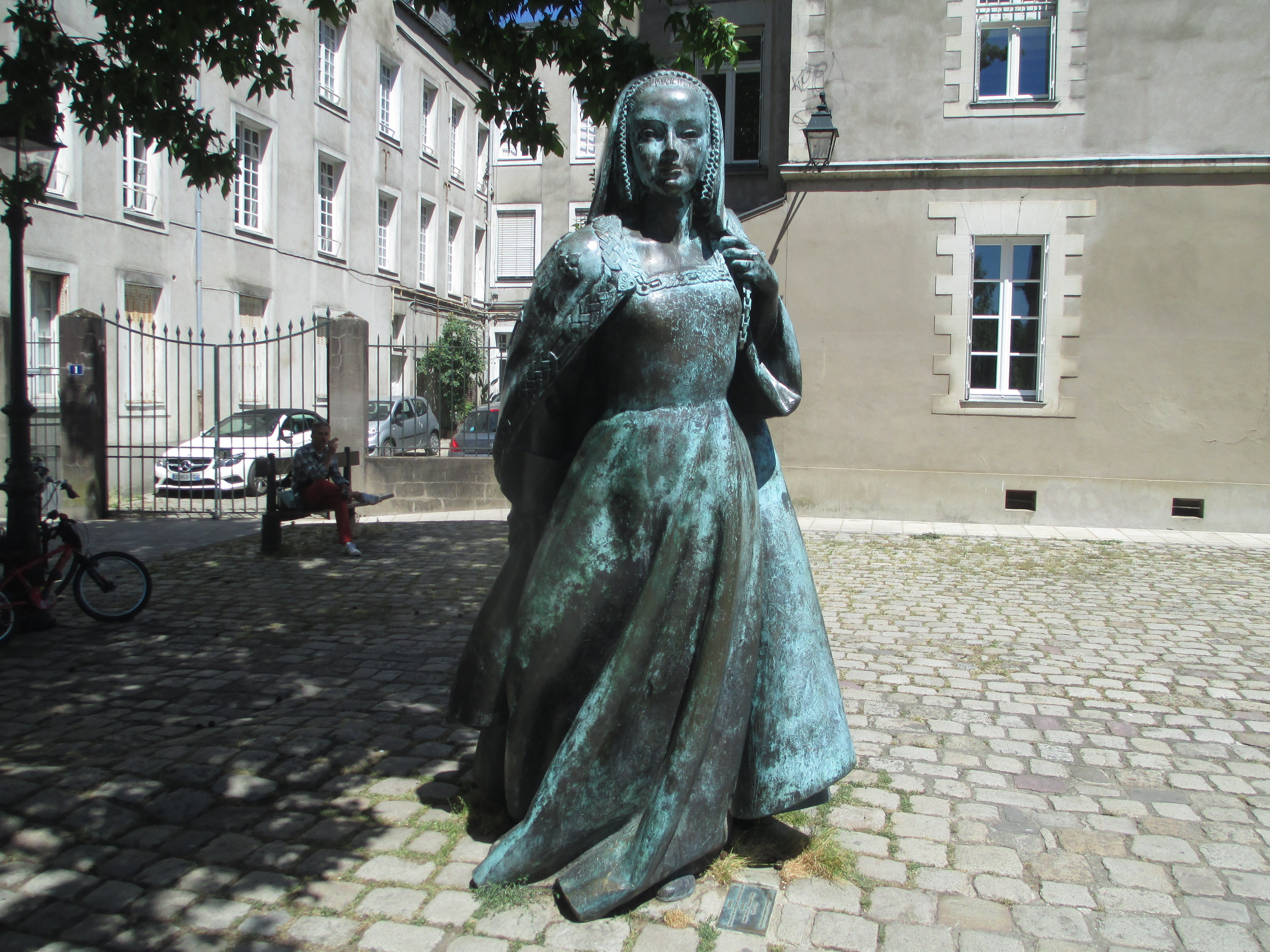 פסל של אן מבריטני בעיר נאנט